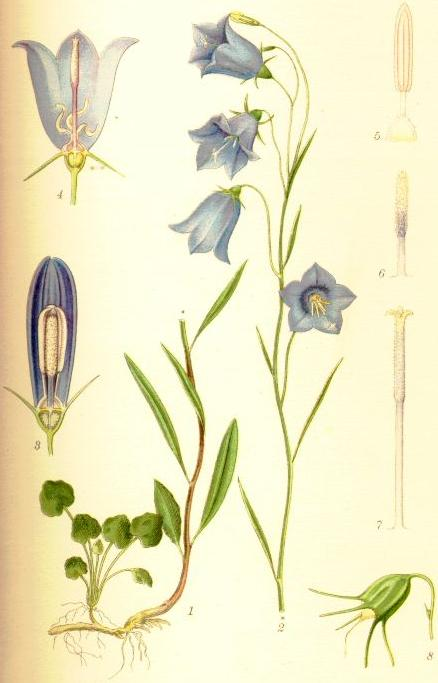 Campanula rotundifolia